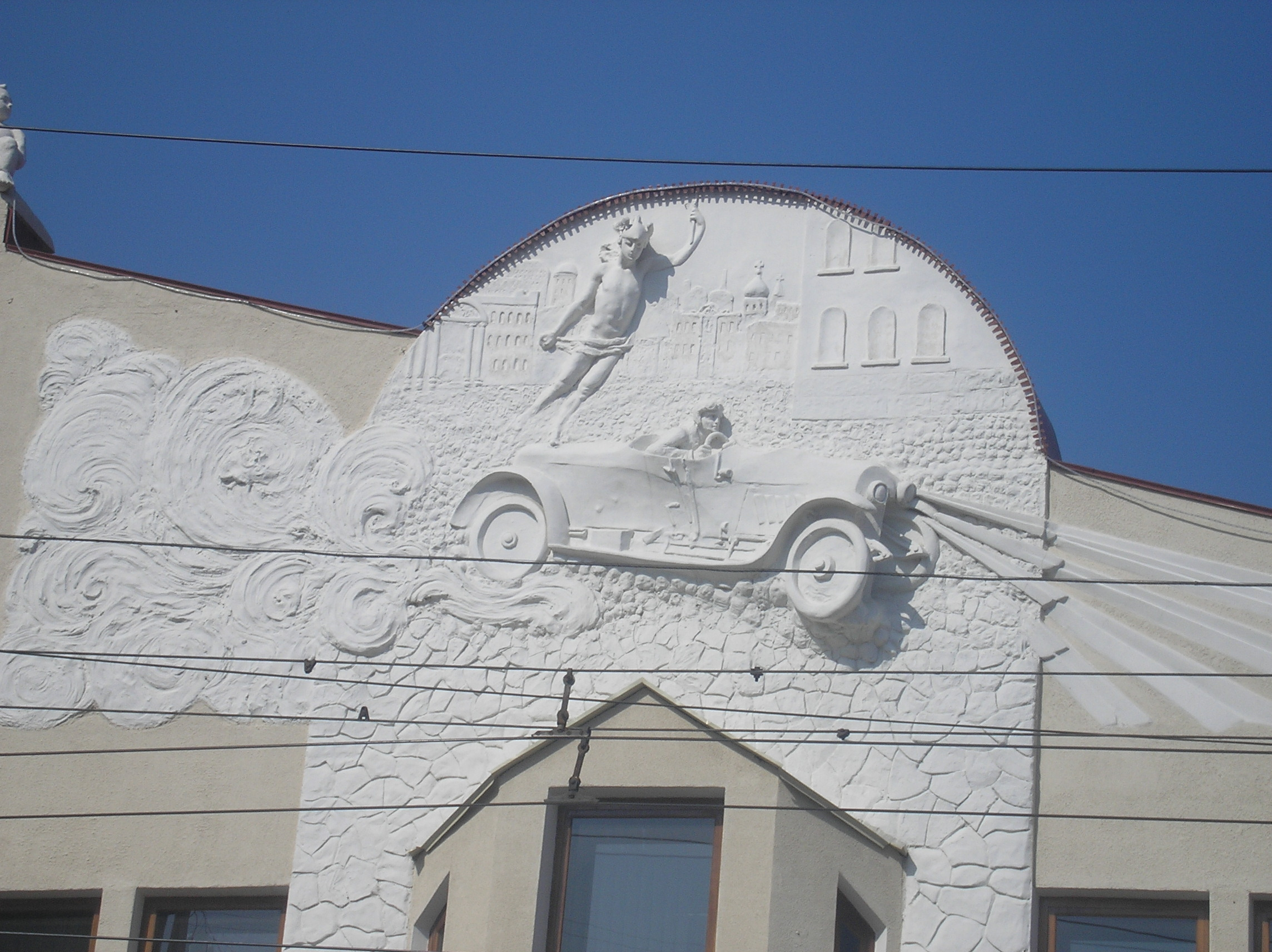 Барельеф с автомобилем на здании на ул. Московской 116 (между ул. Вольской и Чапаева), Саратов